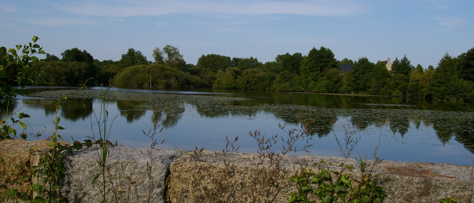 Etang des forges d'Hermet (Mayenne)